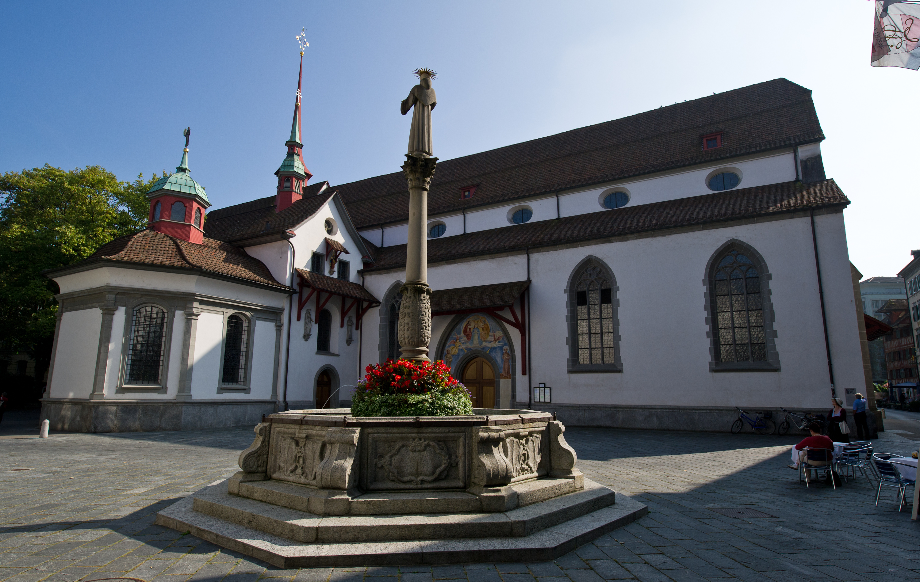 Franziskanerkirche St Maria in der Au, Luzern, LU, Schweiz.